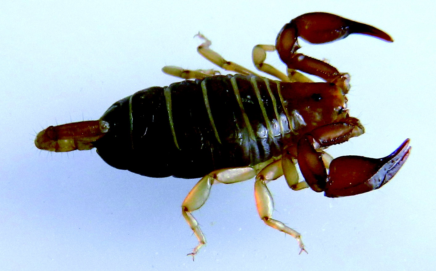 Euscorpius lycius alive female